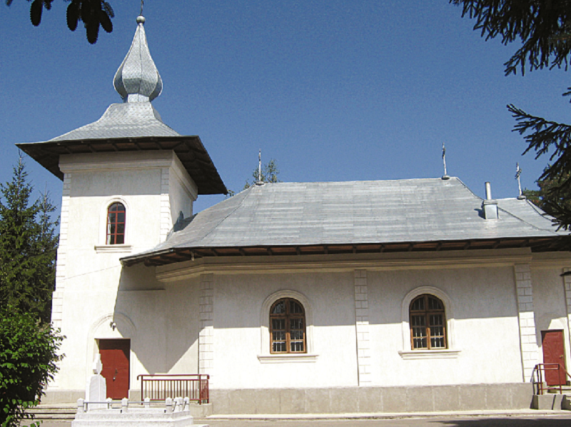 Biserica „Sf. Nicolae”